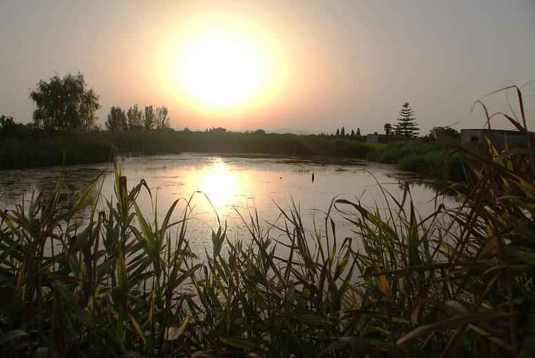 Ullal del terme d'Albalat